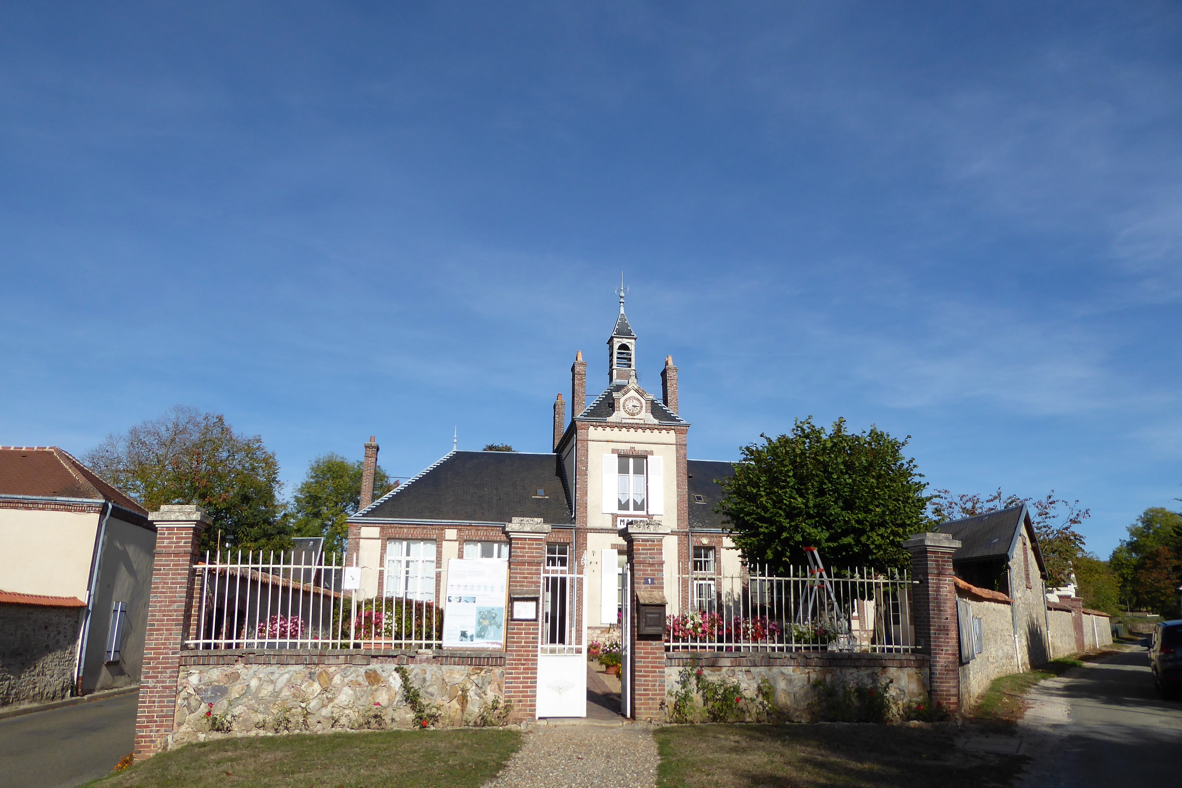 mairie de Saint-Lucien, Eure-et-Loir, France.